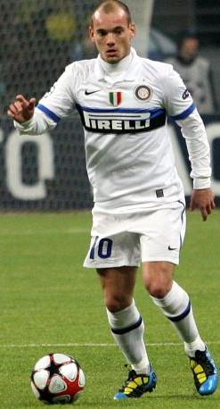 Sneijder durante la partita contro il CSKA Mosca del 6 aprile 2010